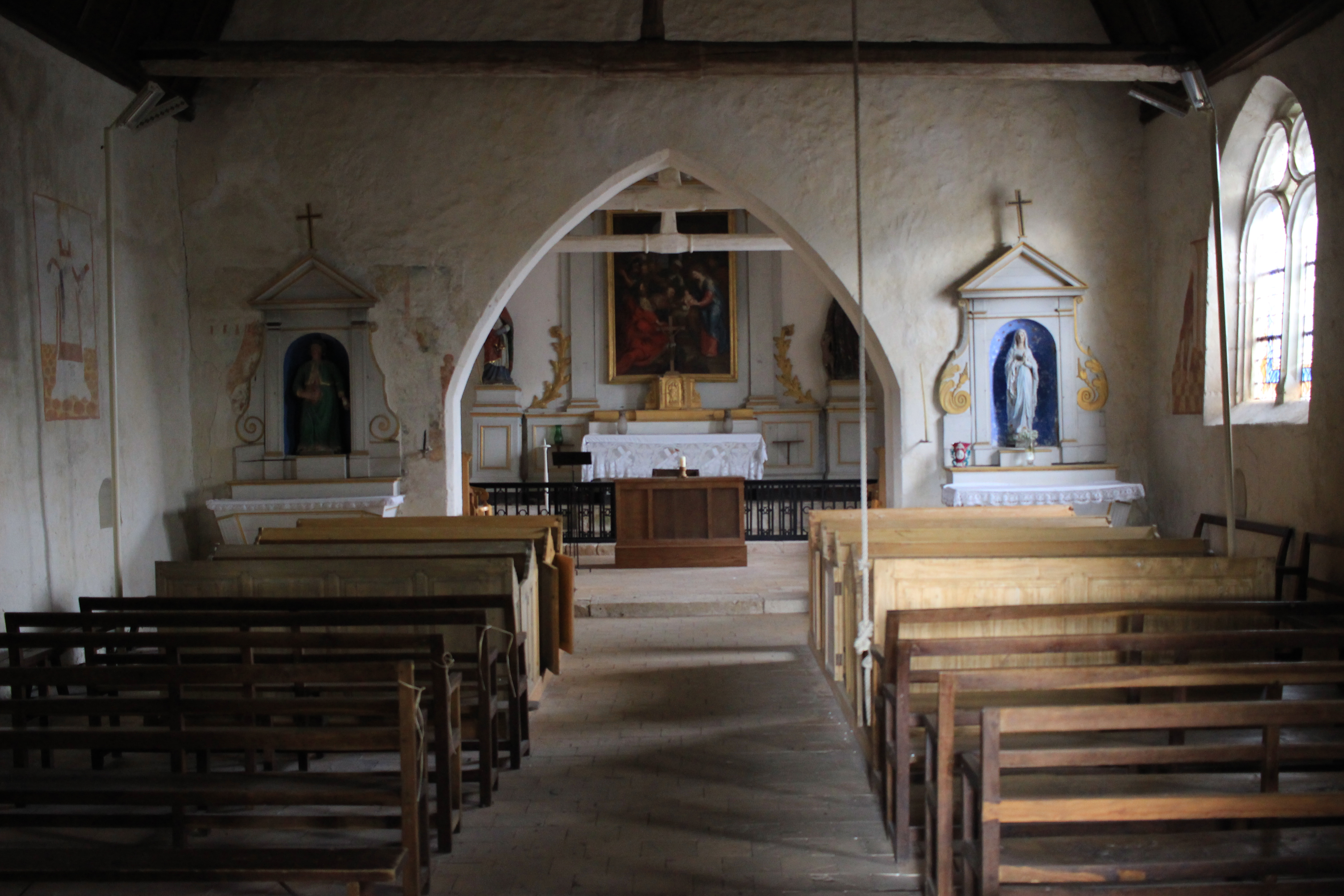 Église de Saint-Nicolas-des-Motets